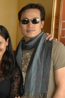 Roger Fan